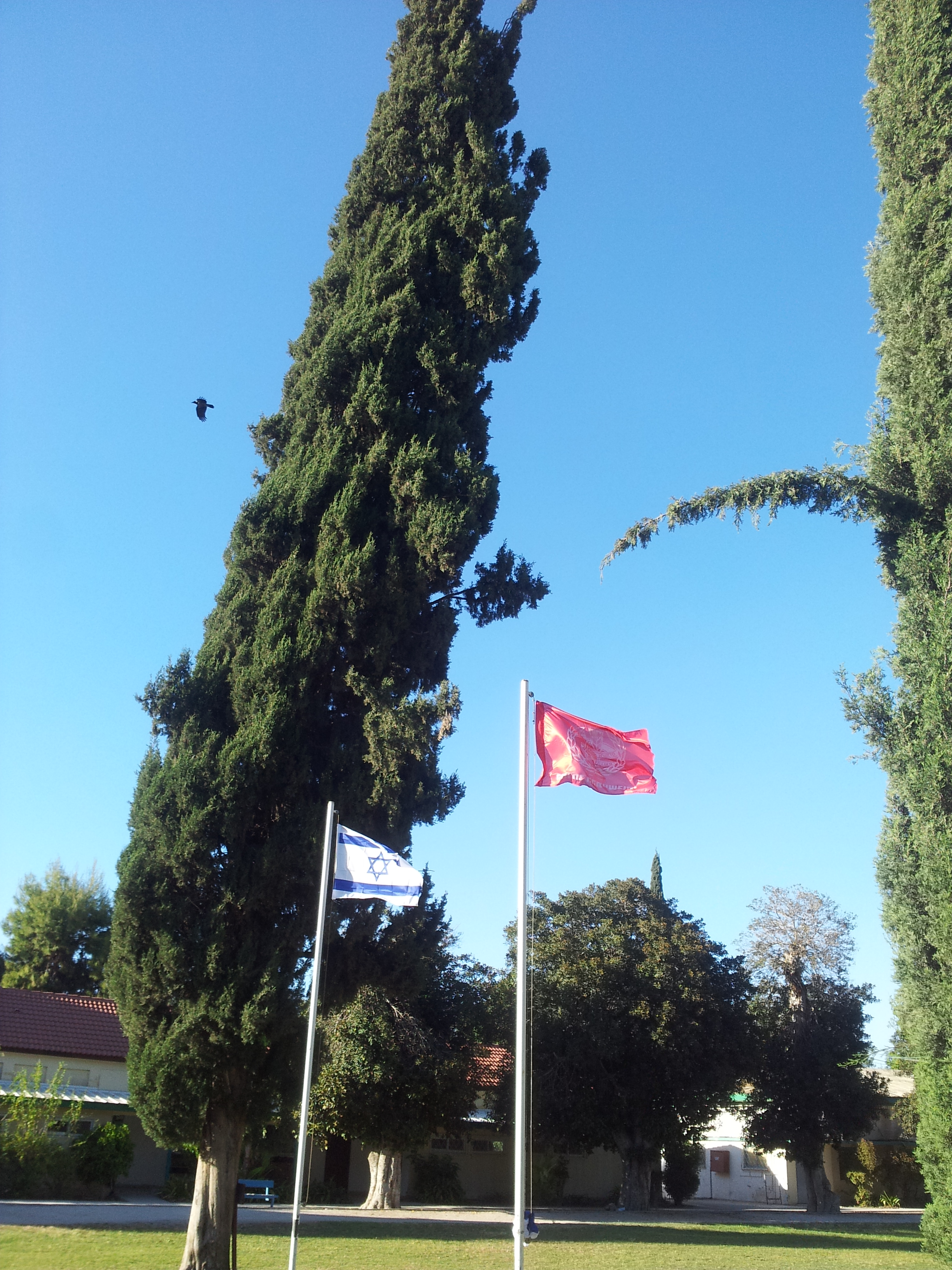 דגל ישראל לצד דגל אדום בבית החינוך המשותף דגניה יום לפני האחד במאי.